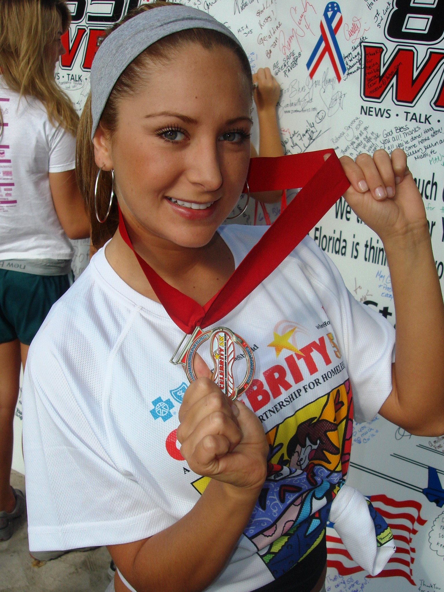 tomada en isla Watson antes de la salida de la carrera de las celebridades 5k en Miami Fl.